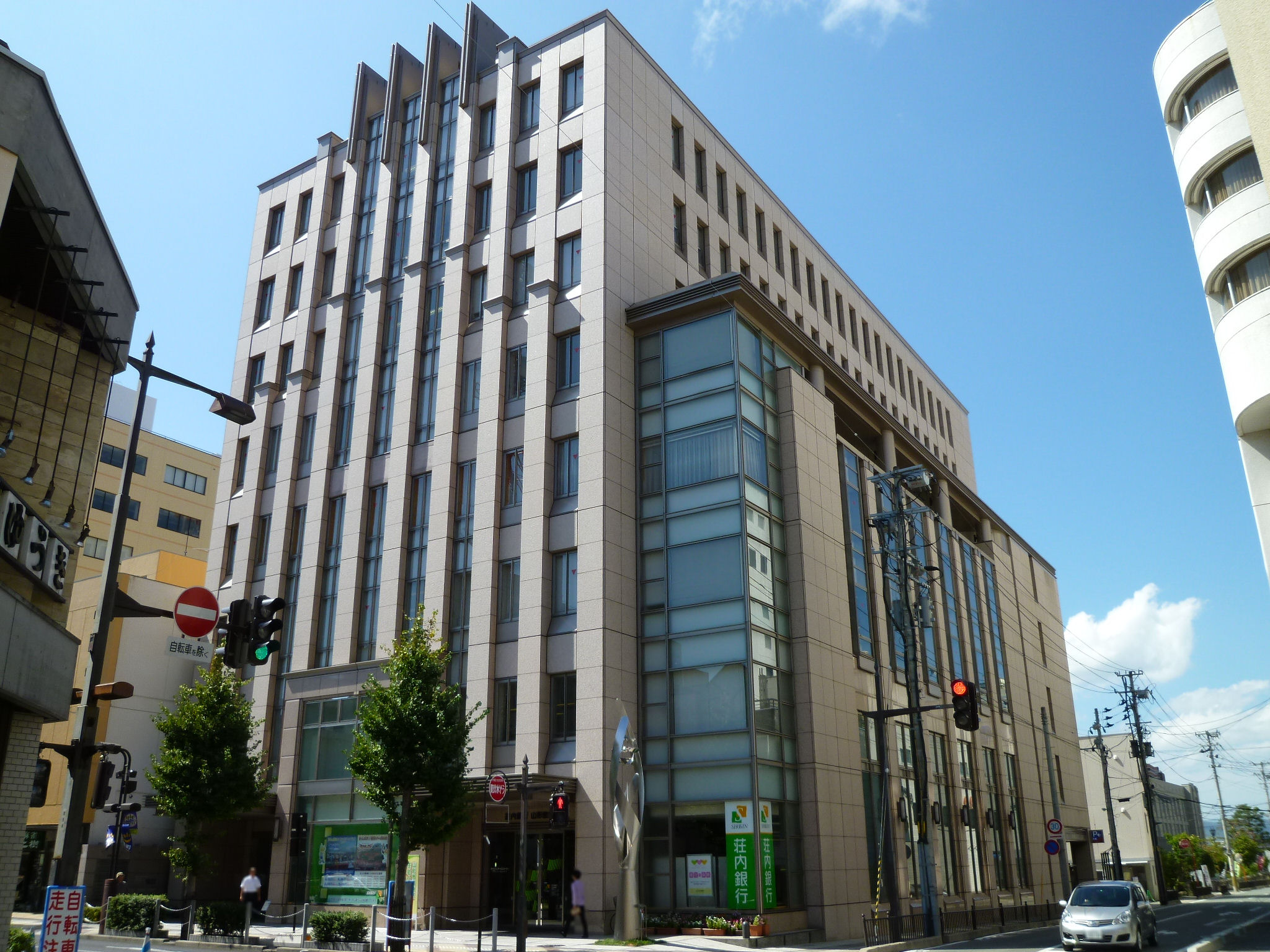 荘銀山形ビル（山形県山形市）。荘内銀行山形営業部ほかテナントが入居。